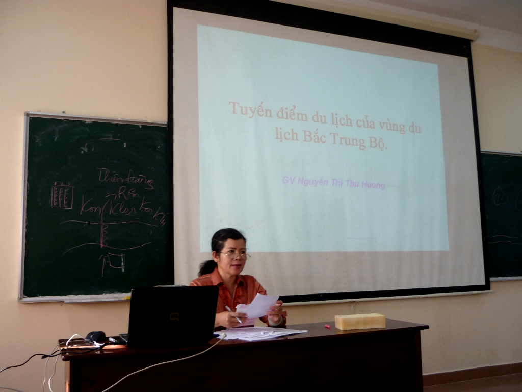 Giáo viên